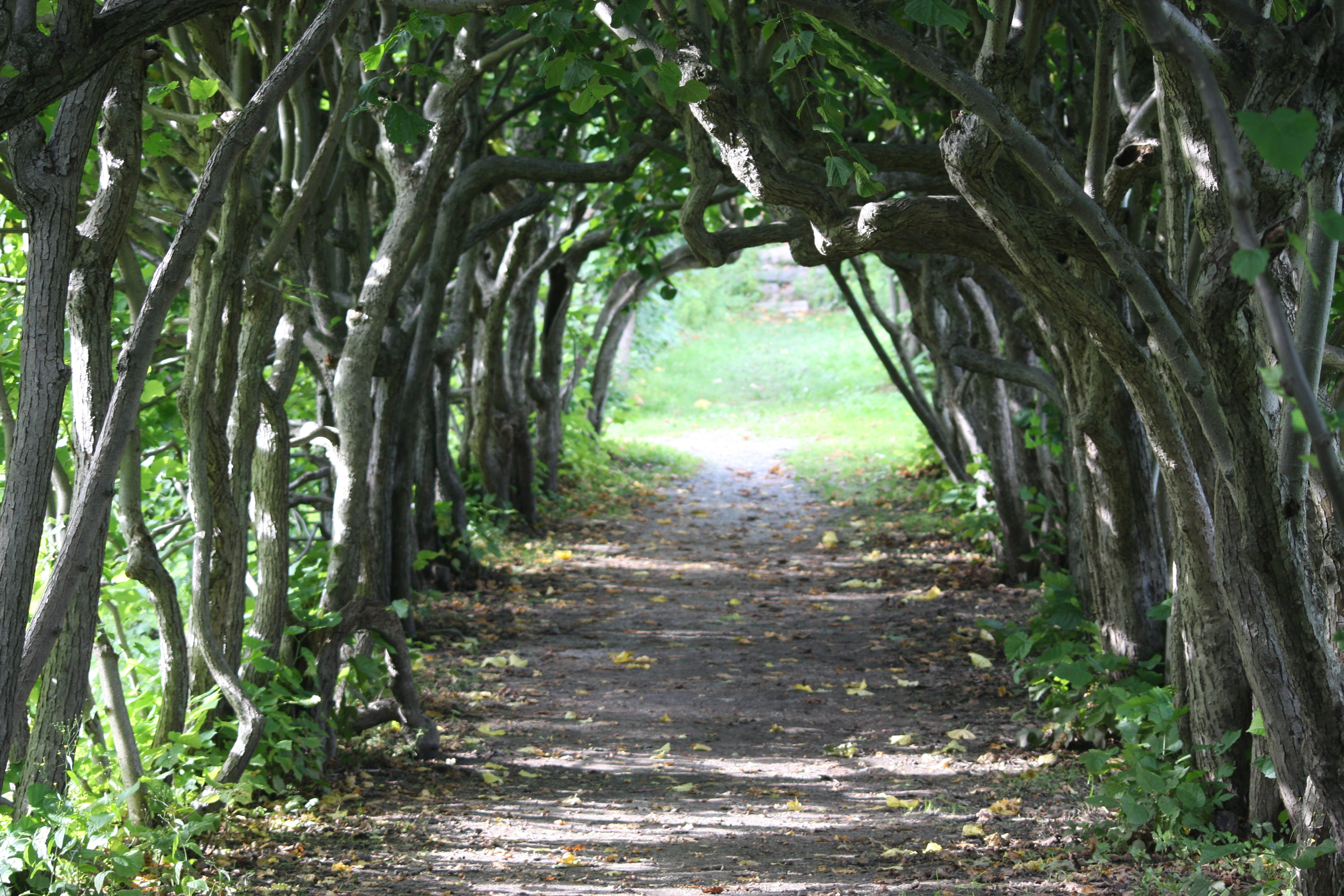 Röd manor in Halden, southeastern Norway. The manor has belonged to several families, and was visited by Thomas Robert Malthus in 1799.